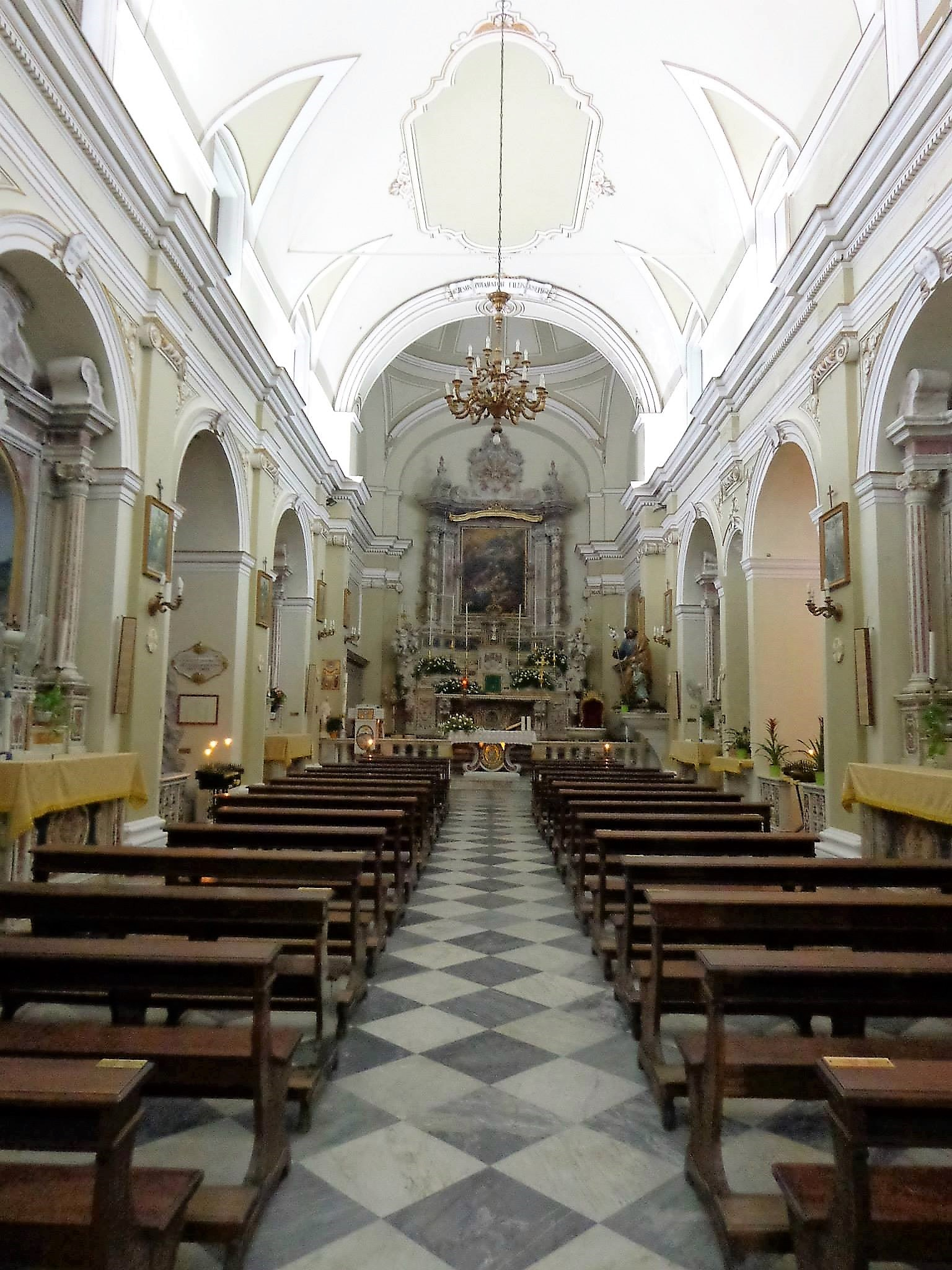 Navata, chiesa di San Giuseppe